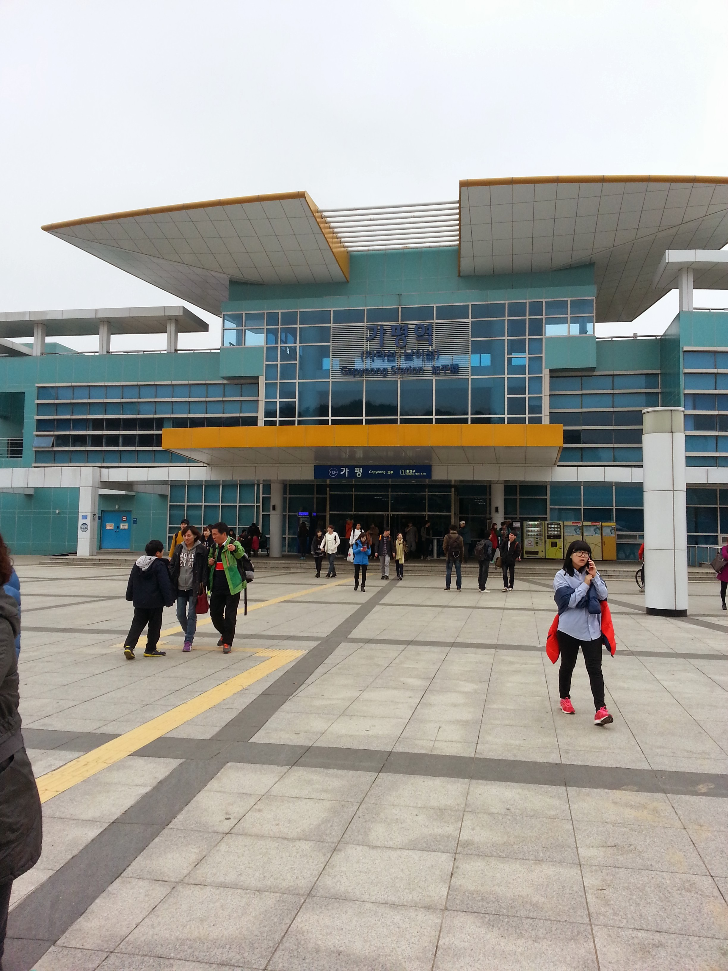 加平駅正面